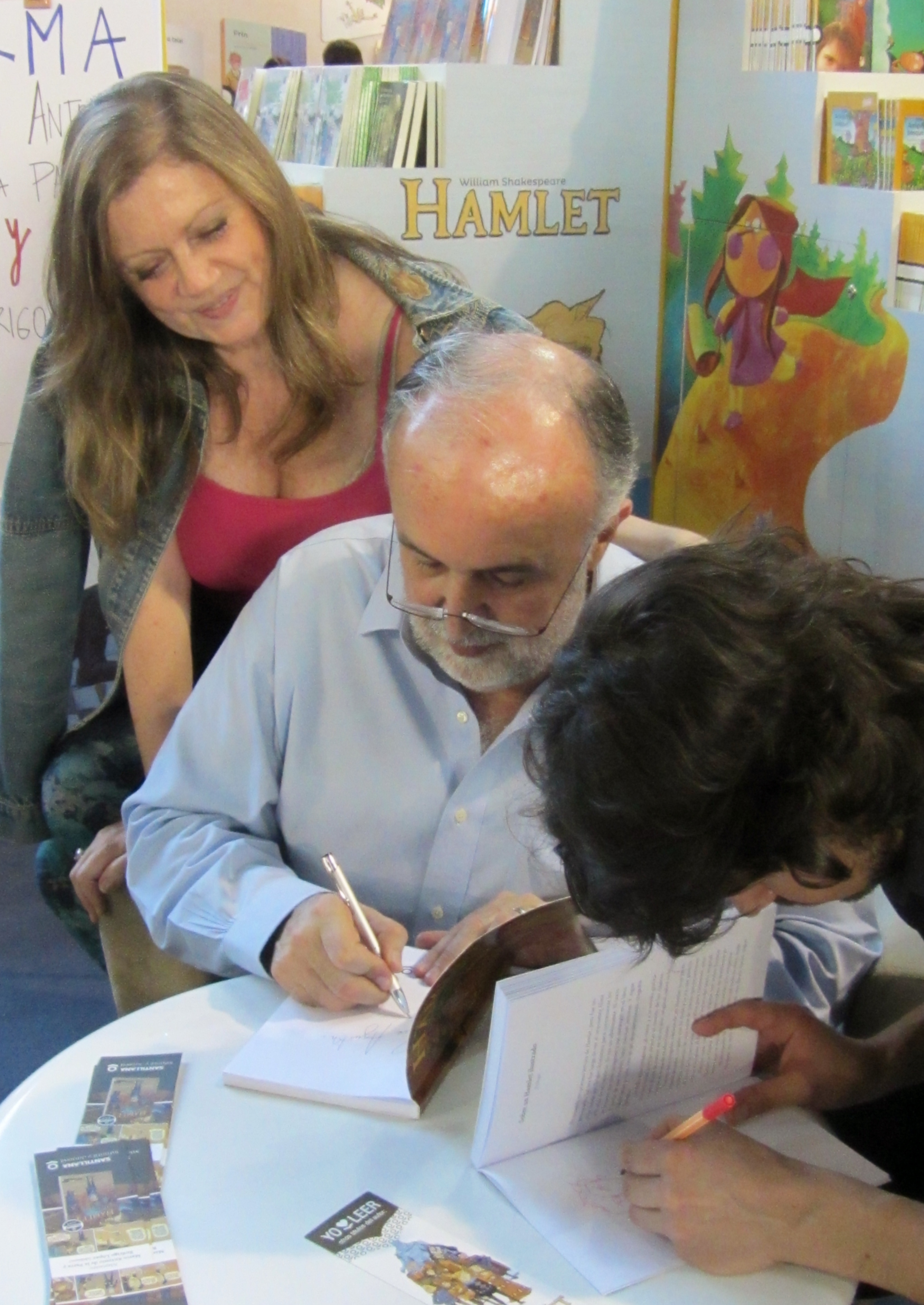 El dramaturgo chileno Marco Antonio de la Parra y el dibujante Rodrigo López firman ejemplares de la adaptación del libro Hamlet en la Feria Internacional del Libro de Santiago 2016. De pie, la periodista Ana Josefa Silva, esposa del dramaturgo.